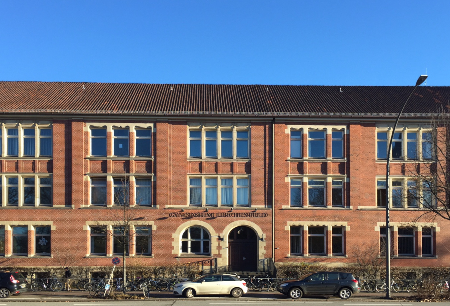 Gymnasium Lerchenfeld, stürzende Linien korrigiert